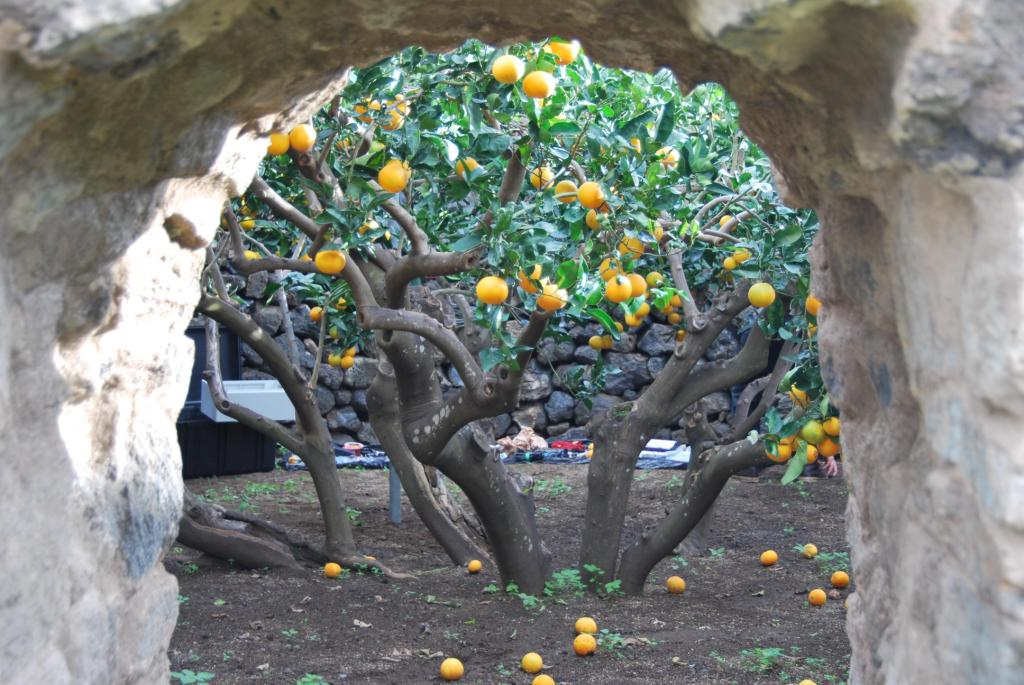 pantelleria_garden